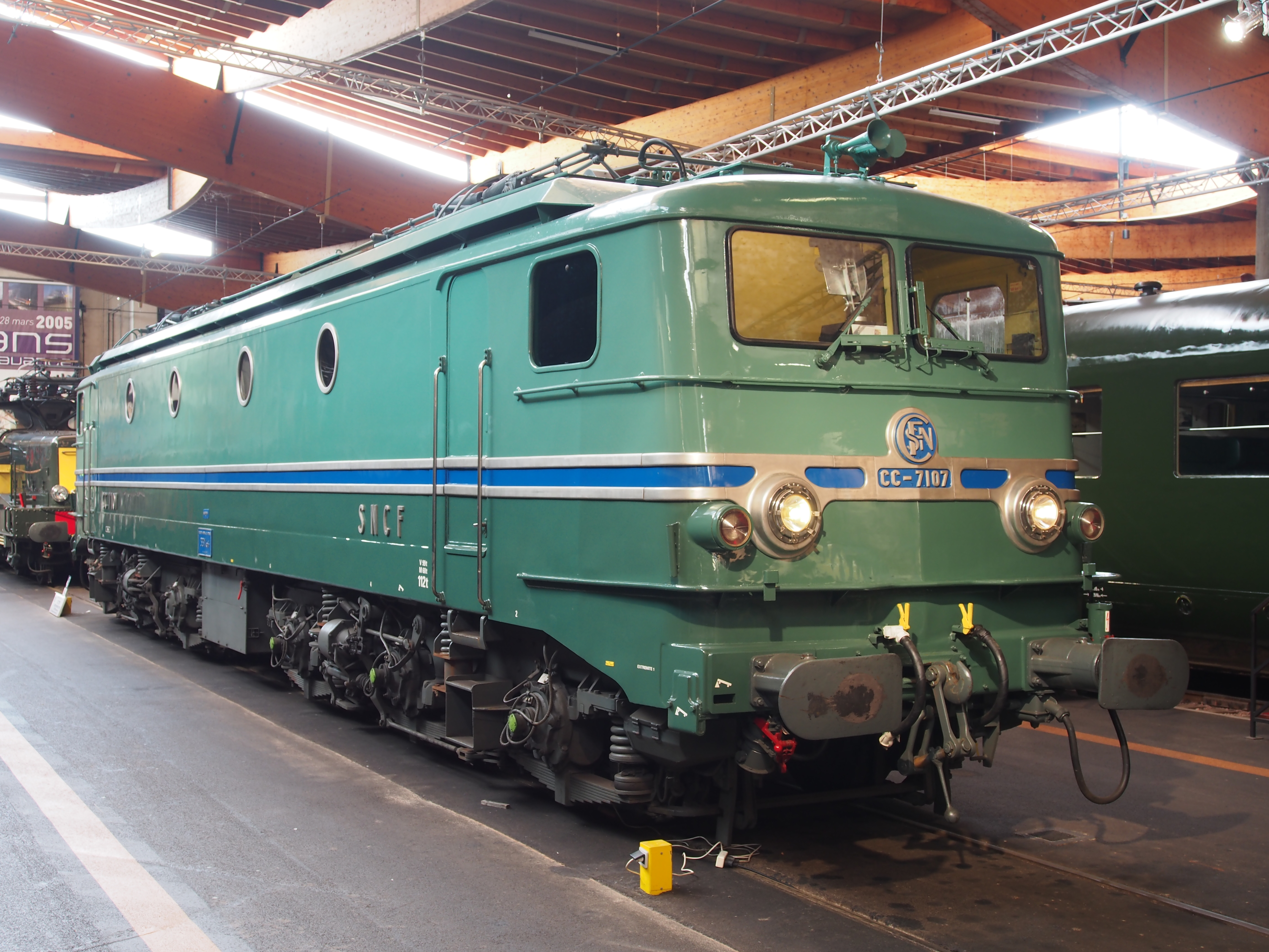 Photographed at Cité du train, Mulhouse, France.